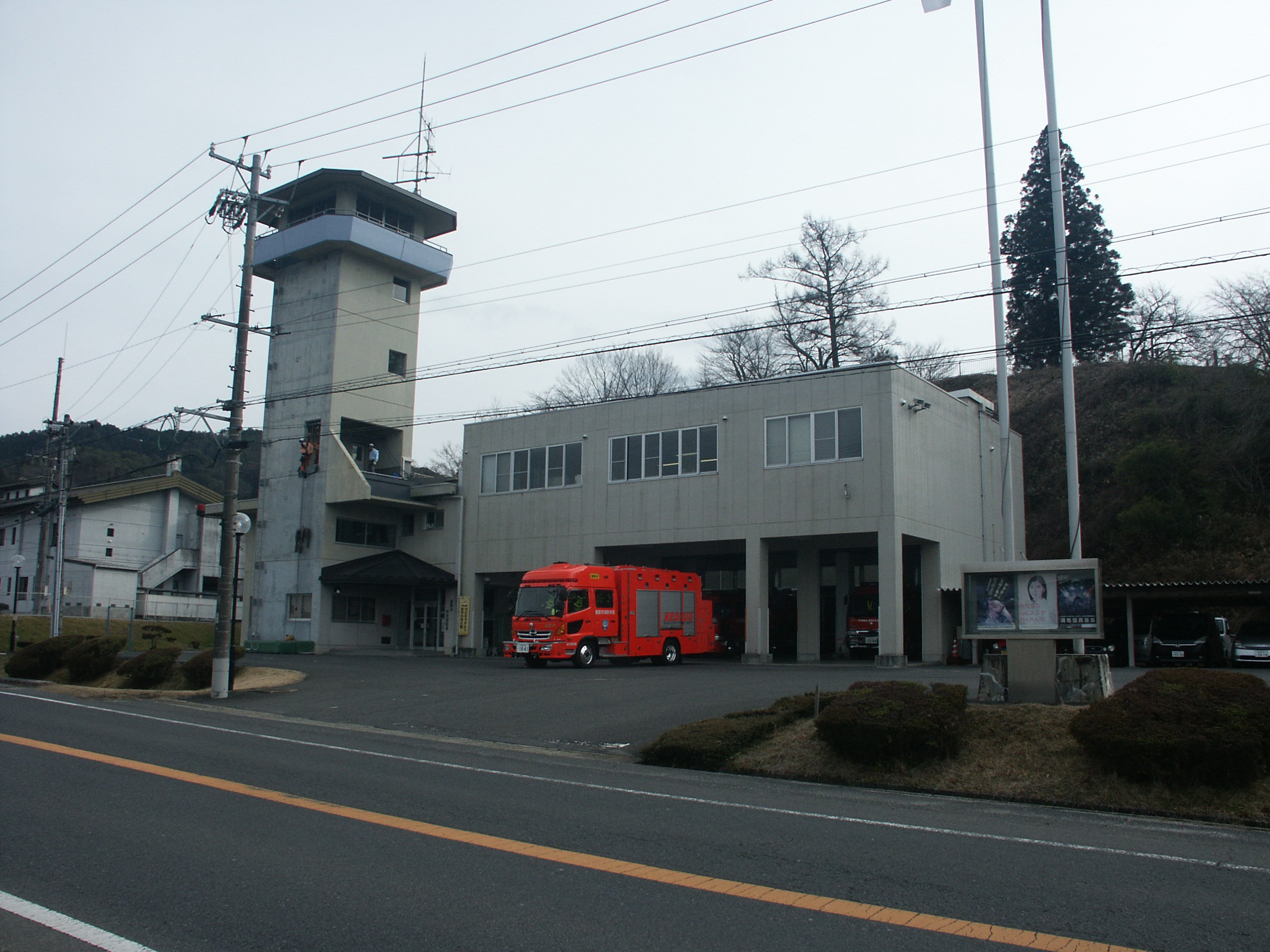 恵那市消防本部岩村消防署